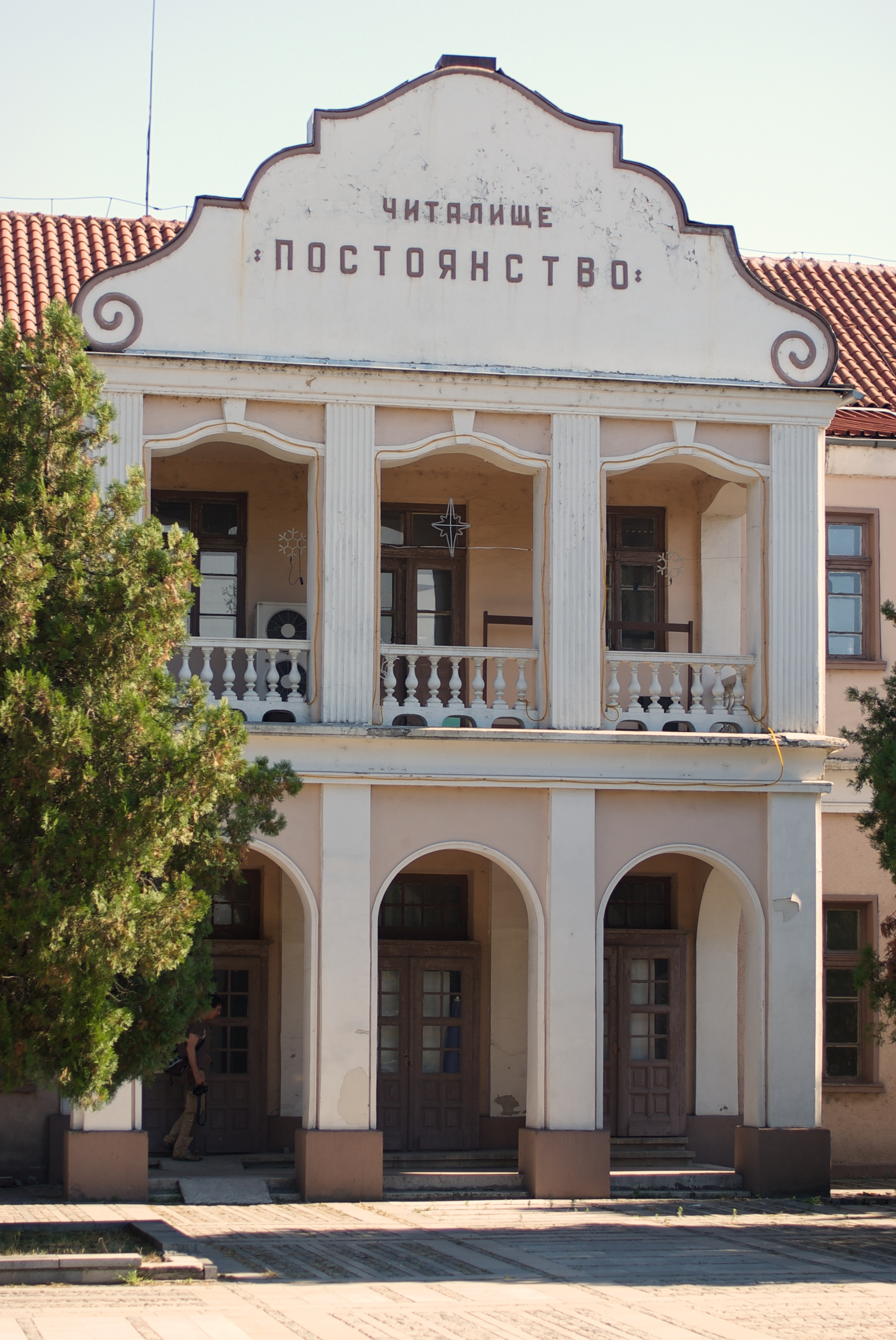 Tschitalischte in Lom